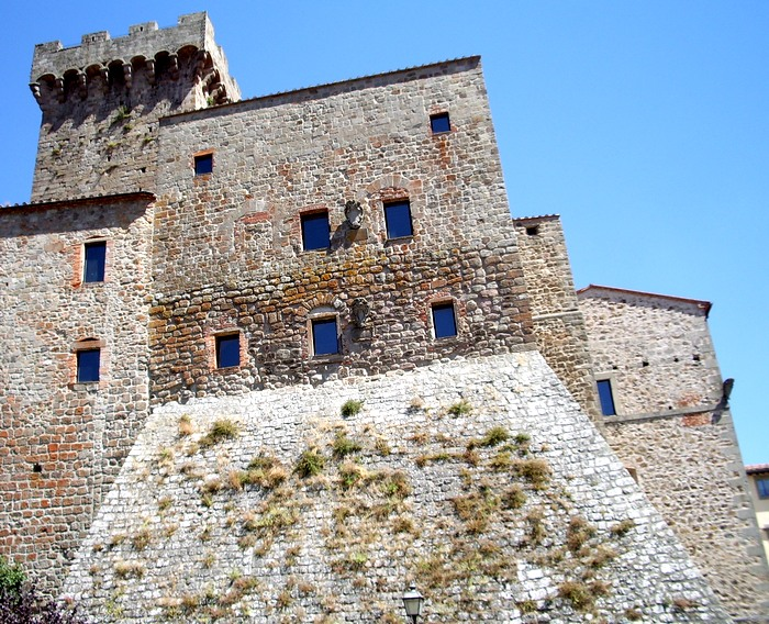 Rocca aldobrandesca di Arcidosso (GR), Tuscany (Italy).